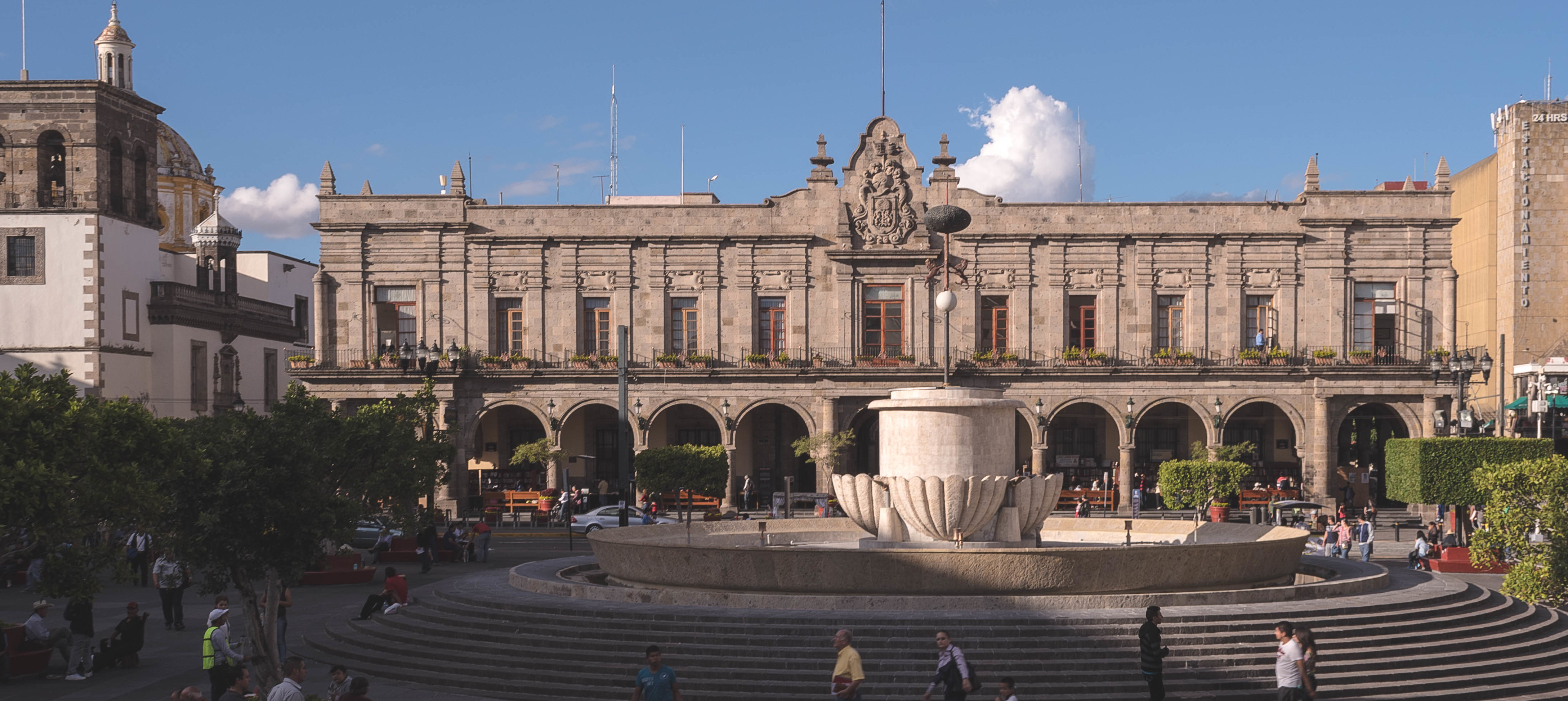 Palacio Municiap de Guadalajara